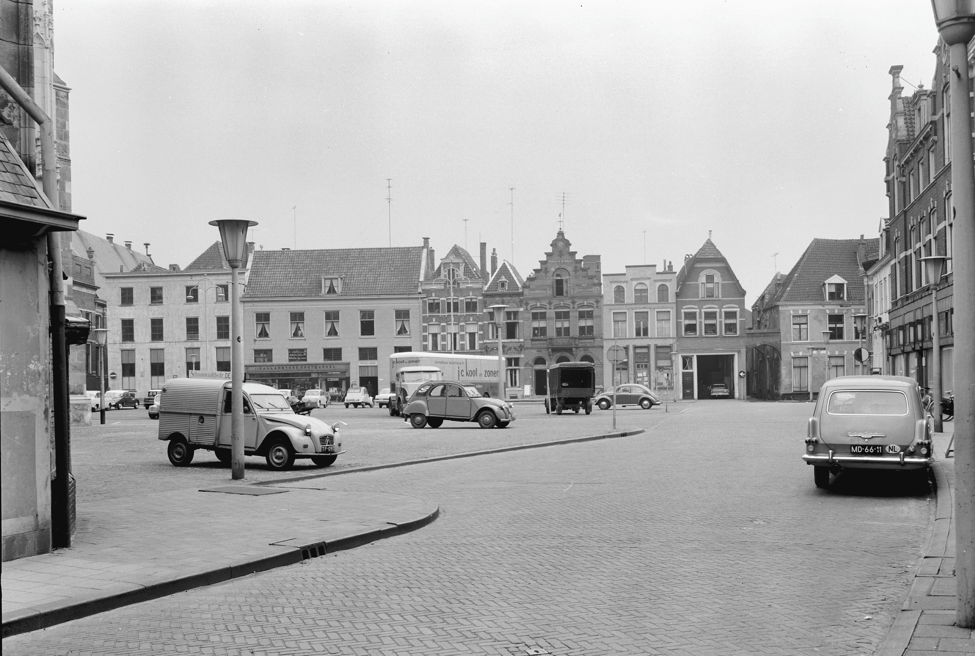 straatwand